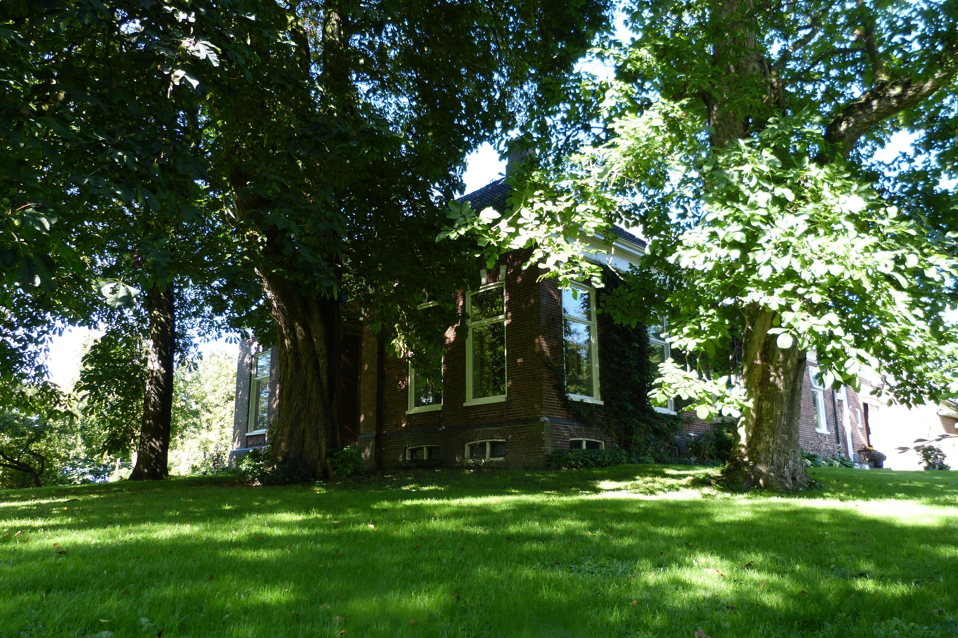 oosterampt2015